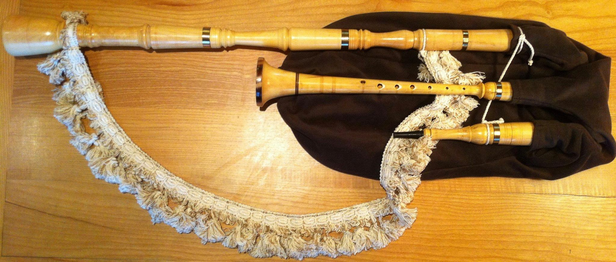 Réplica de Gaita Mirandesa Histórica